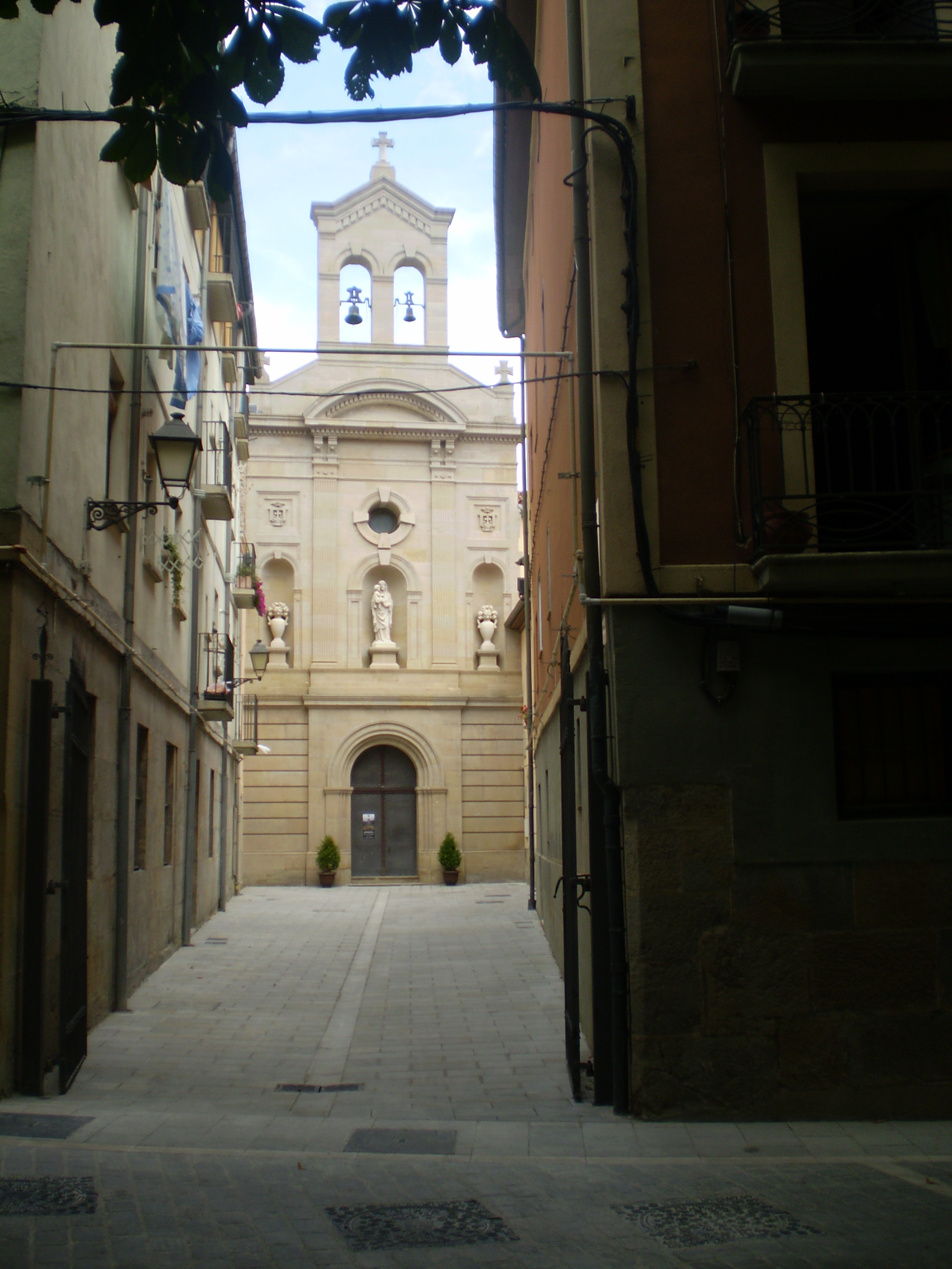 Calle Salsipuedes en el Casco Antiguo de Pamplona (Navarra-España)